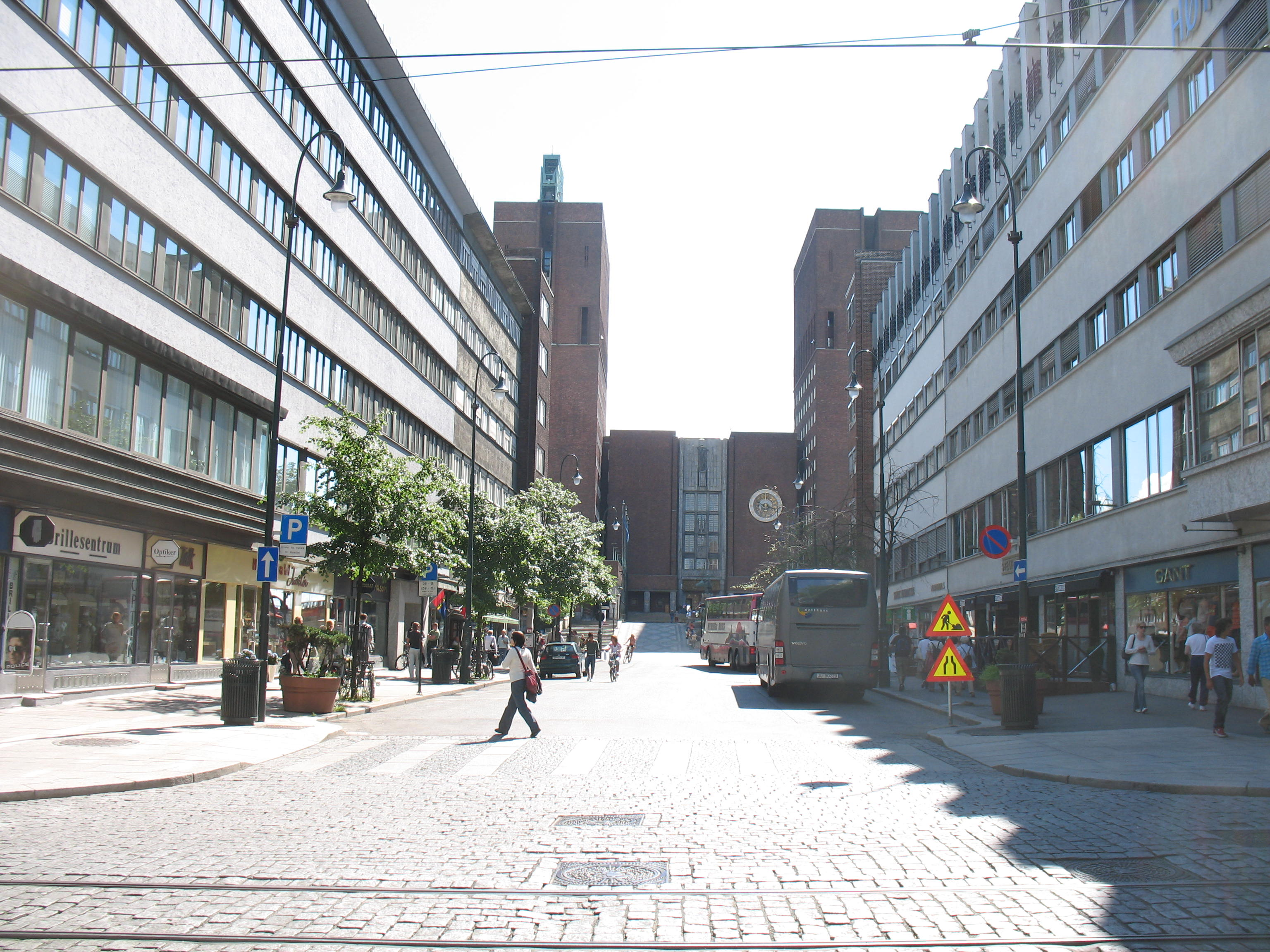 Roald Amundsens gate sett fra Stortingsgata. I bakgrunnen ses Oslo rådhus